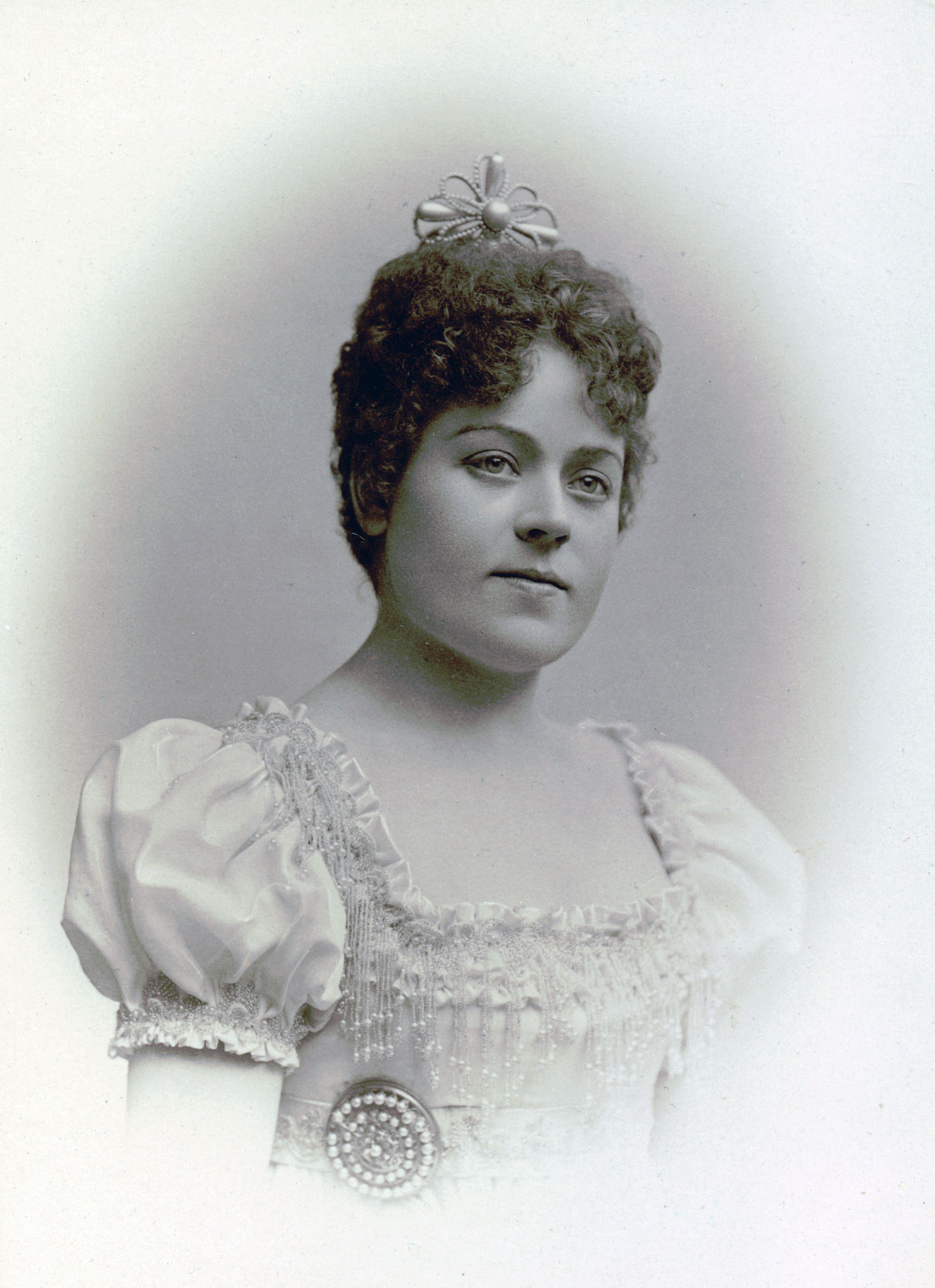 Emma Ekström, skådespelare och sångare vid Vasateatern 1892